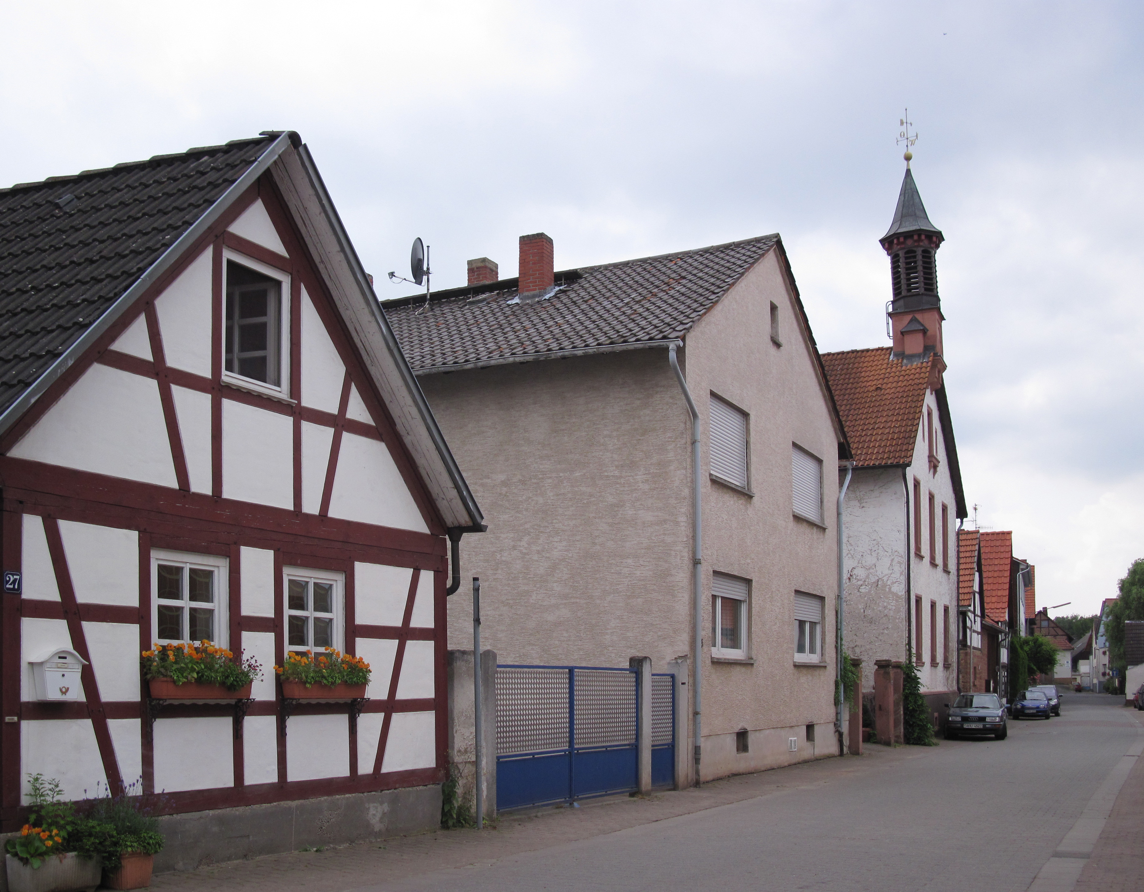 Alte Schule in Reinheim-Zeilhard